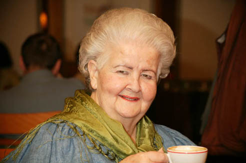 Trude Mally, Altmeisterin des Dudelns (=spezifische Wiener Art des Jodelns). Das Foto ist im Restaurant "Prilisauer" in Wien 14 bei einem der Mally-Abende "Trude Mally und ihre Freunde" entstanden